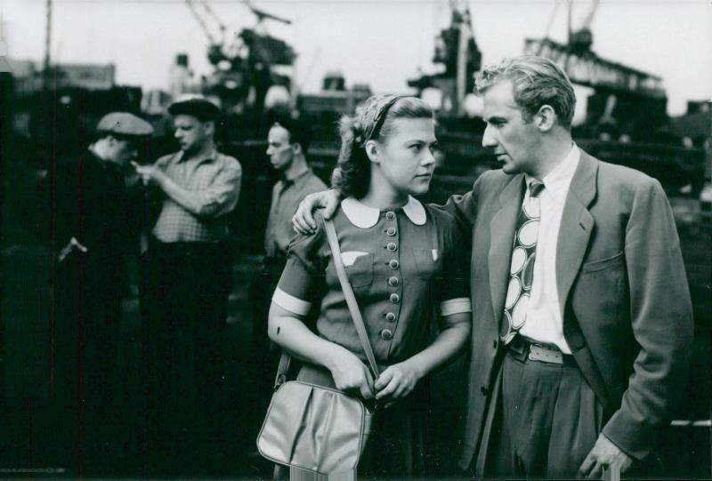 Foto på Nine-Christine Jönsson och Bengt Eklund taget i samband med filmen Hamnstad. Infört i Svenska Dagbladet 1948-10-18 s. 14.